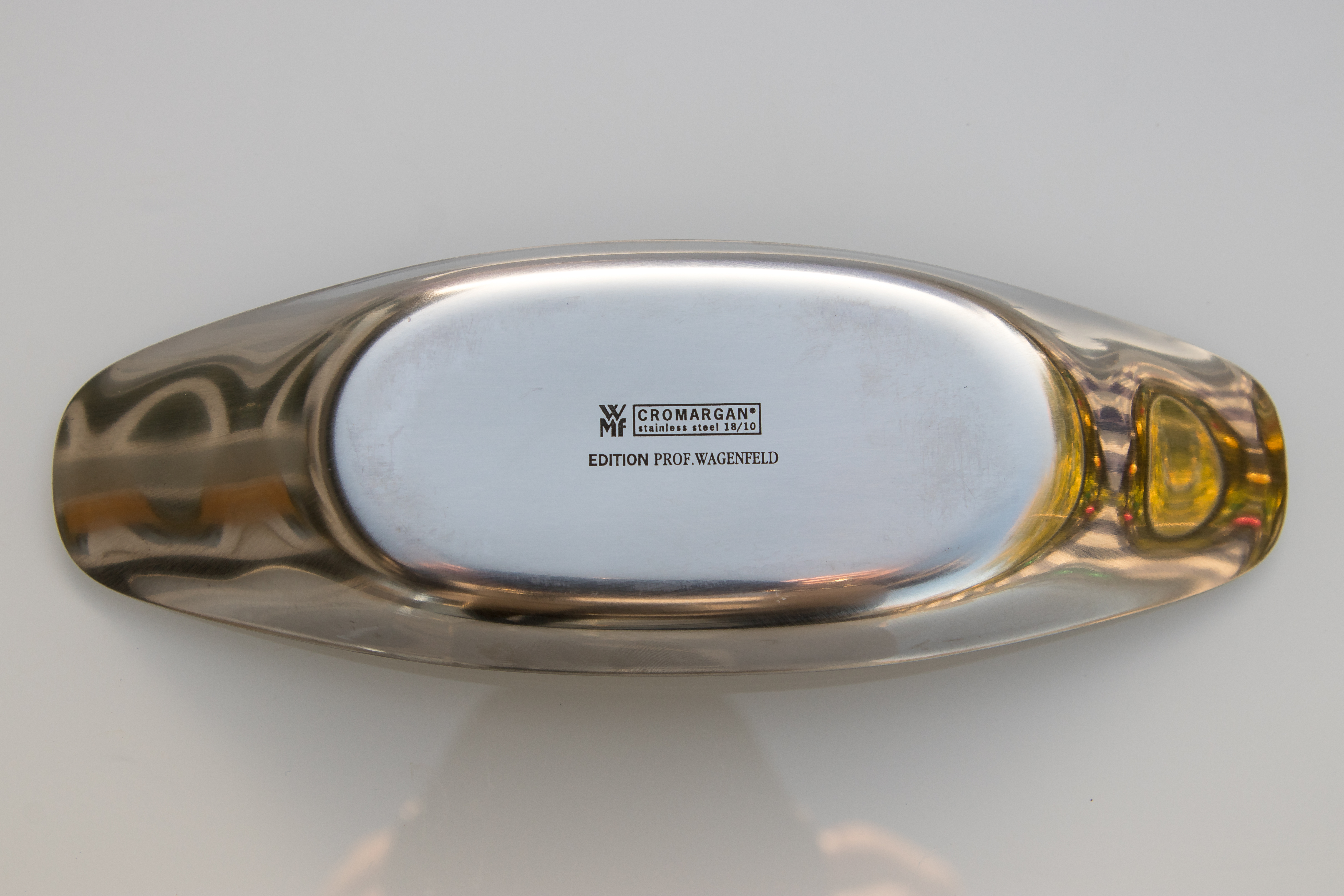 Salz- und Pfefferstreuer "Max & Moritz" von WMF, Entwurf: Wilhelm Wagenfeld